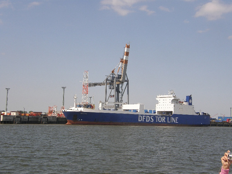 Bilder aus Cuxhaven